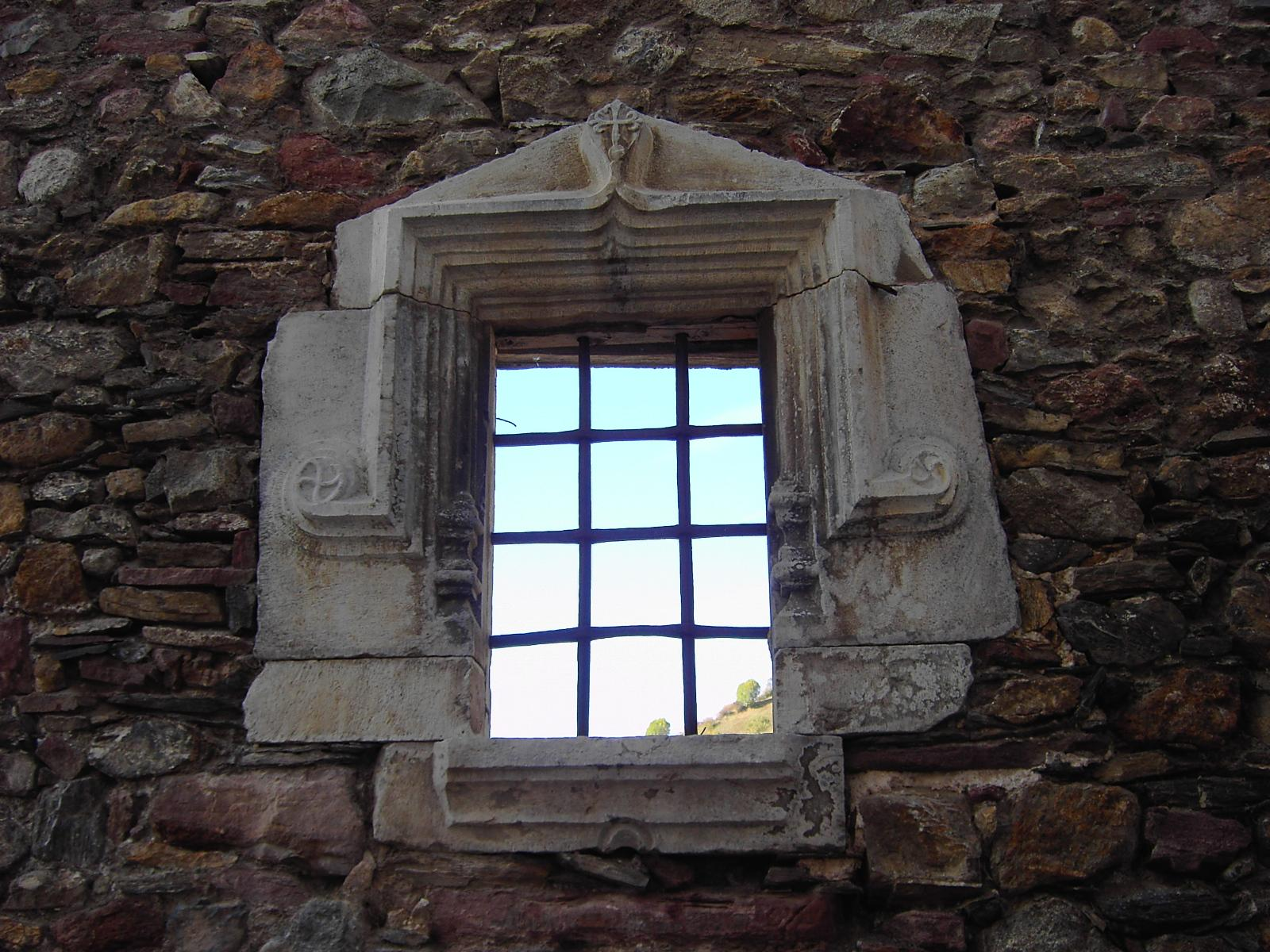 Una vieja ventana, de una casa cuyo tejado ya no existe, en Chistén. Se aprecian algunos símbolos protectores asociados a las antiguas supersticiones pirenaicas.